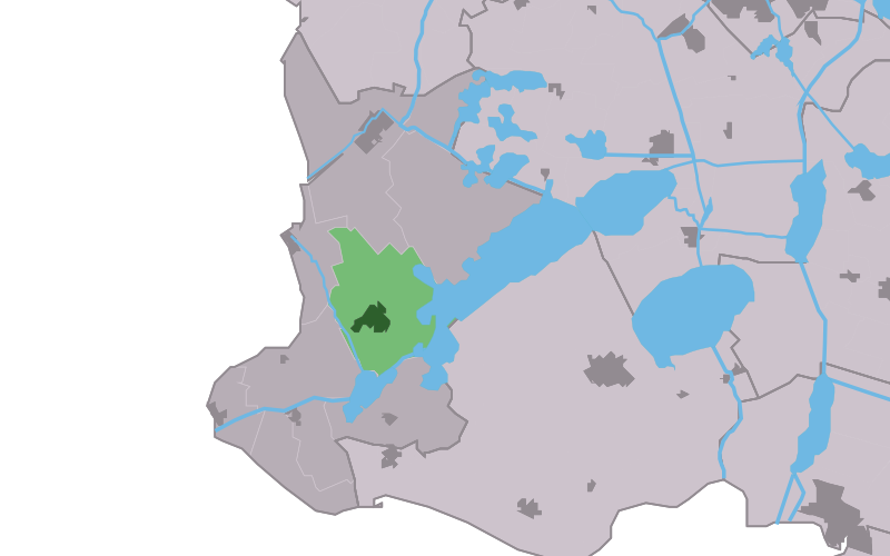 Kaartsje fan himrik fan Koudum